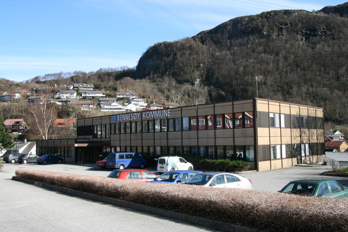 Rennesøy_kommunehus